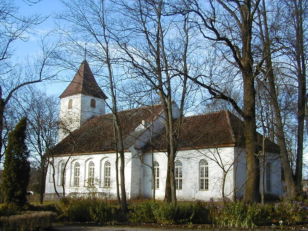 Sabiles baznīca 2000-10-28